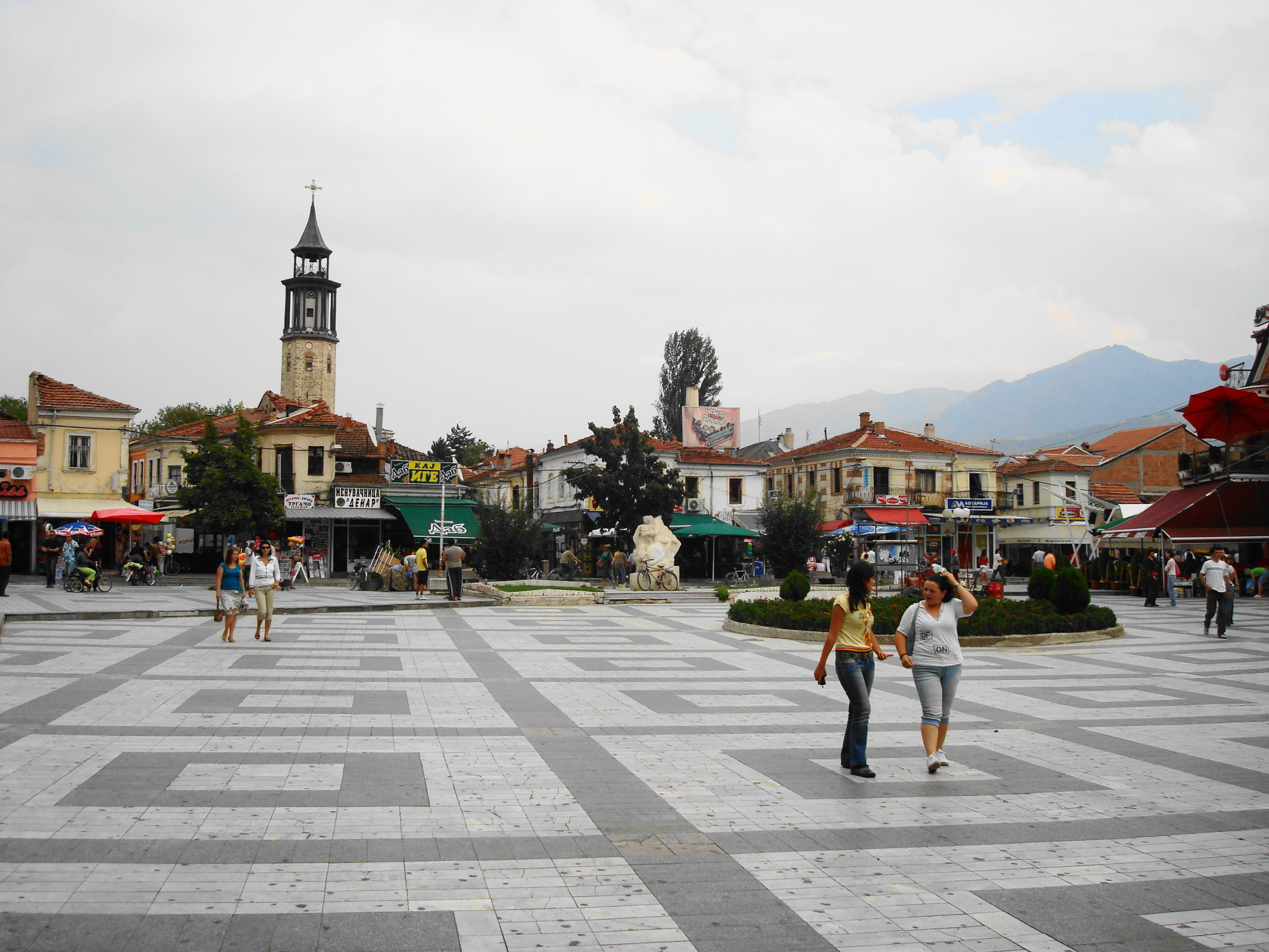 Главни трг,Прилеп.